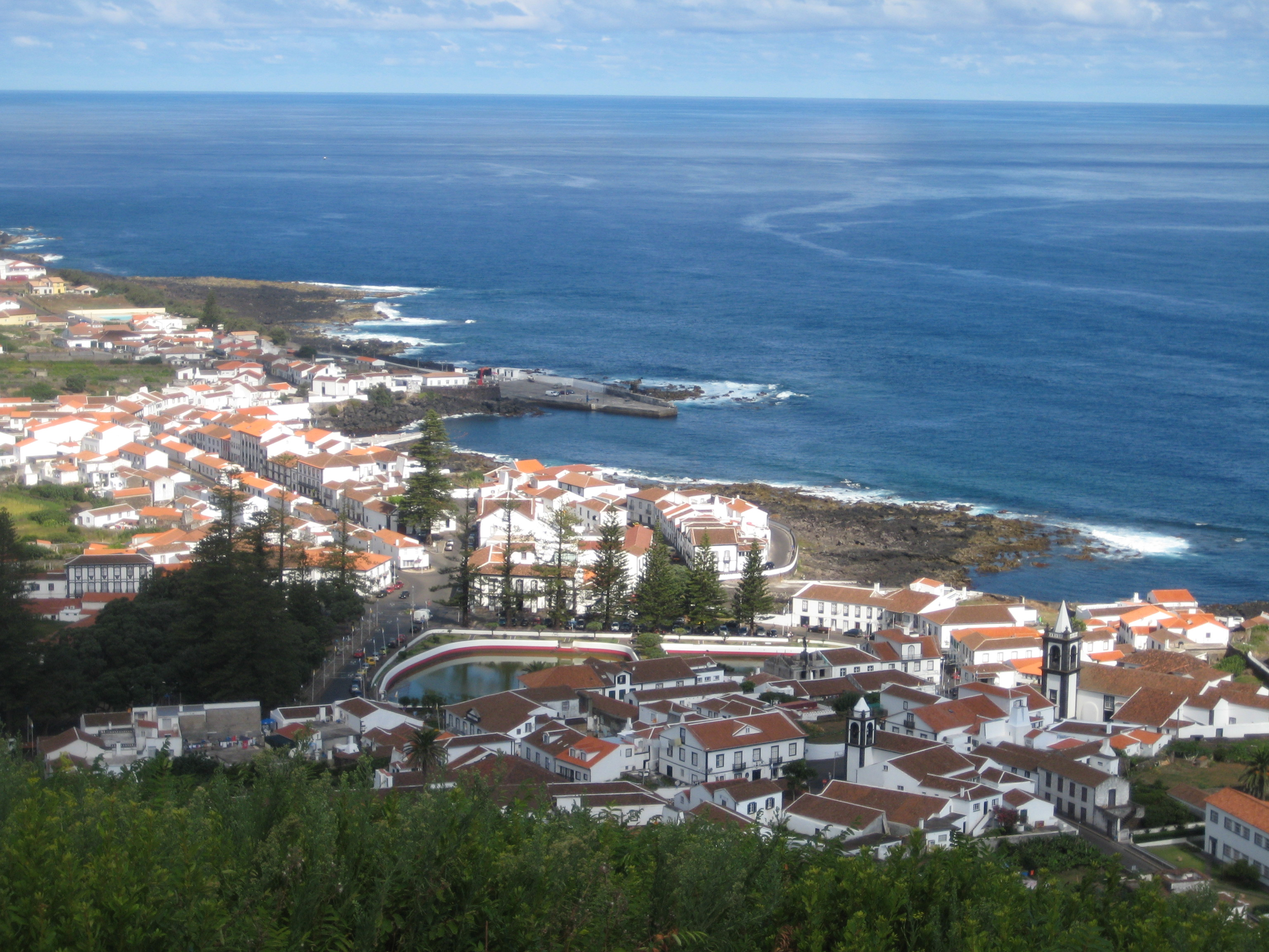 Vista desde Monte Ajuda IV